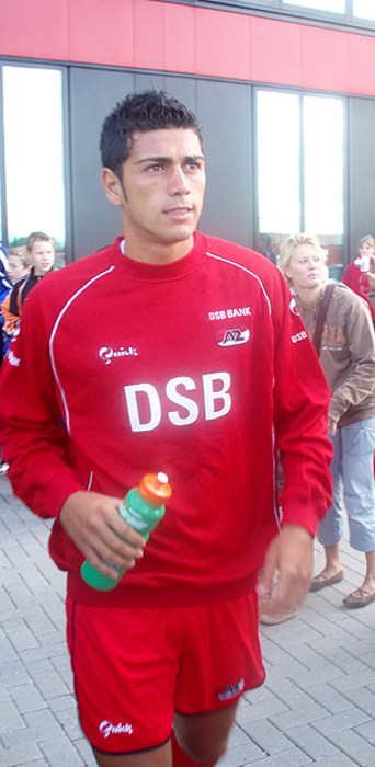 Foto van de voetballer Graziano Pellè op de eerste training van het seizoen 2007/2008 bij AZ Alkmaar.